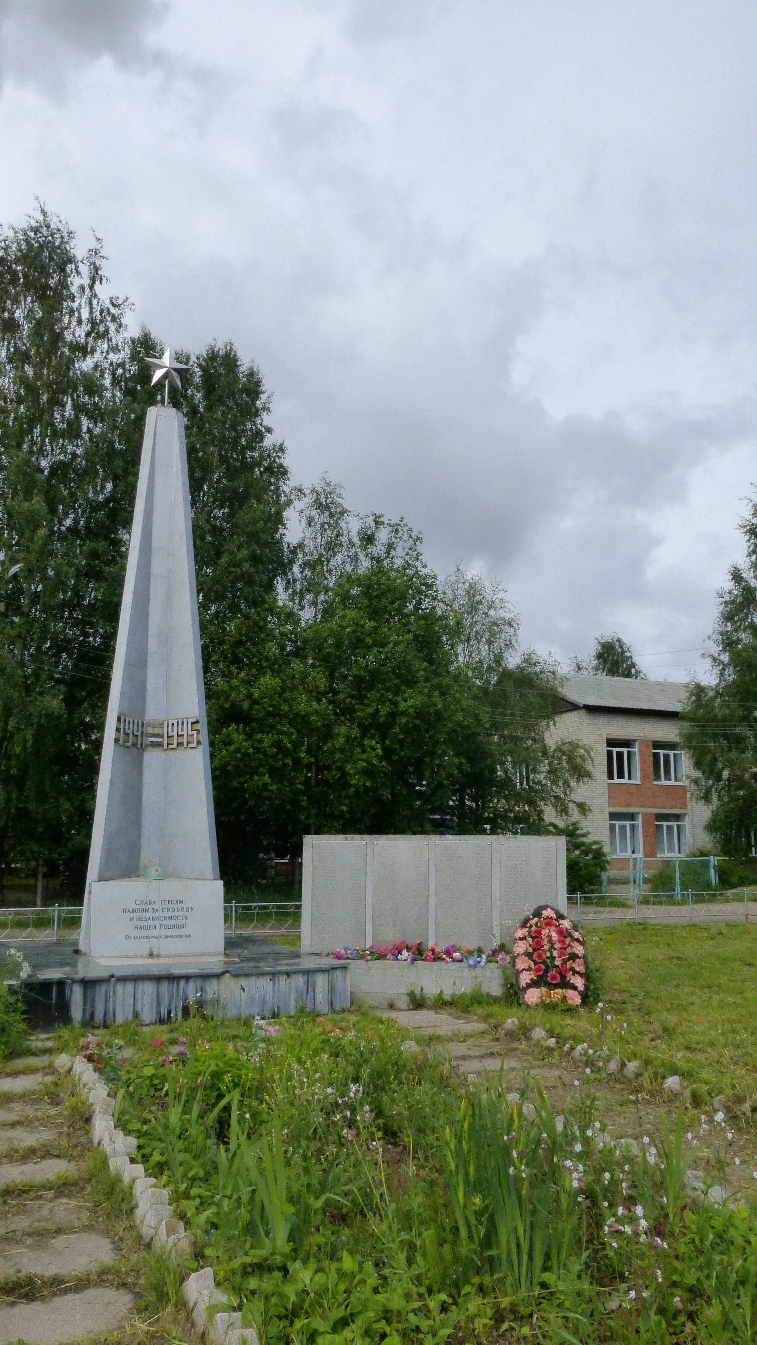 Монумент павшим в годы Великой Отечественной войны в посёлке Эссойла (Республика Карелия).